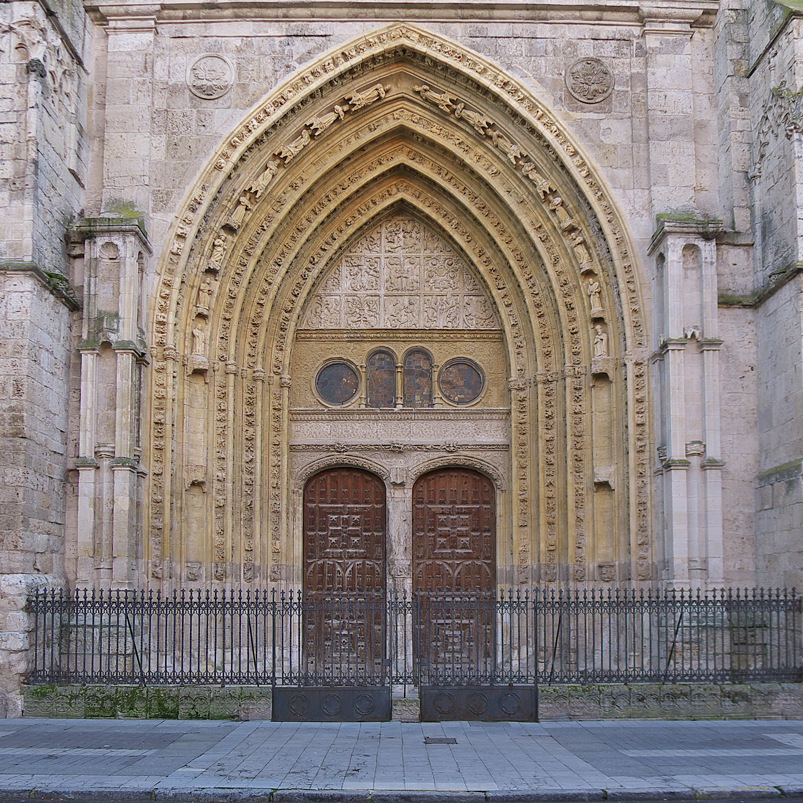 Puerta septentrional del transepto. Trazada, probablemente, por Bartolomé de Solórzano. La autoría de su terminación gótico flamígero es atribuible a Juan de Ruesga.